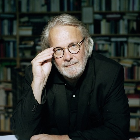 Foto Gerhard Roth